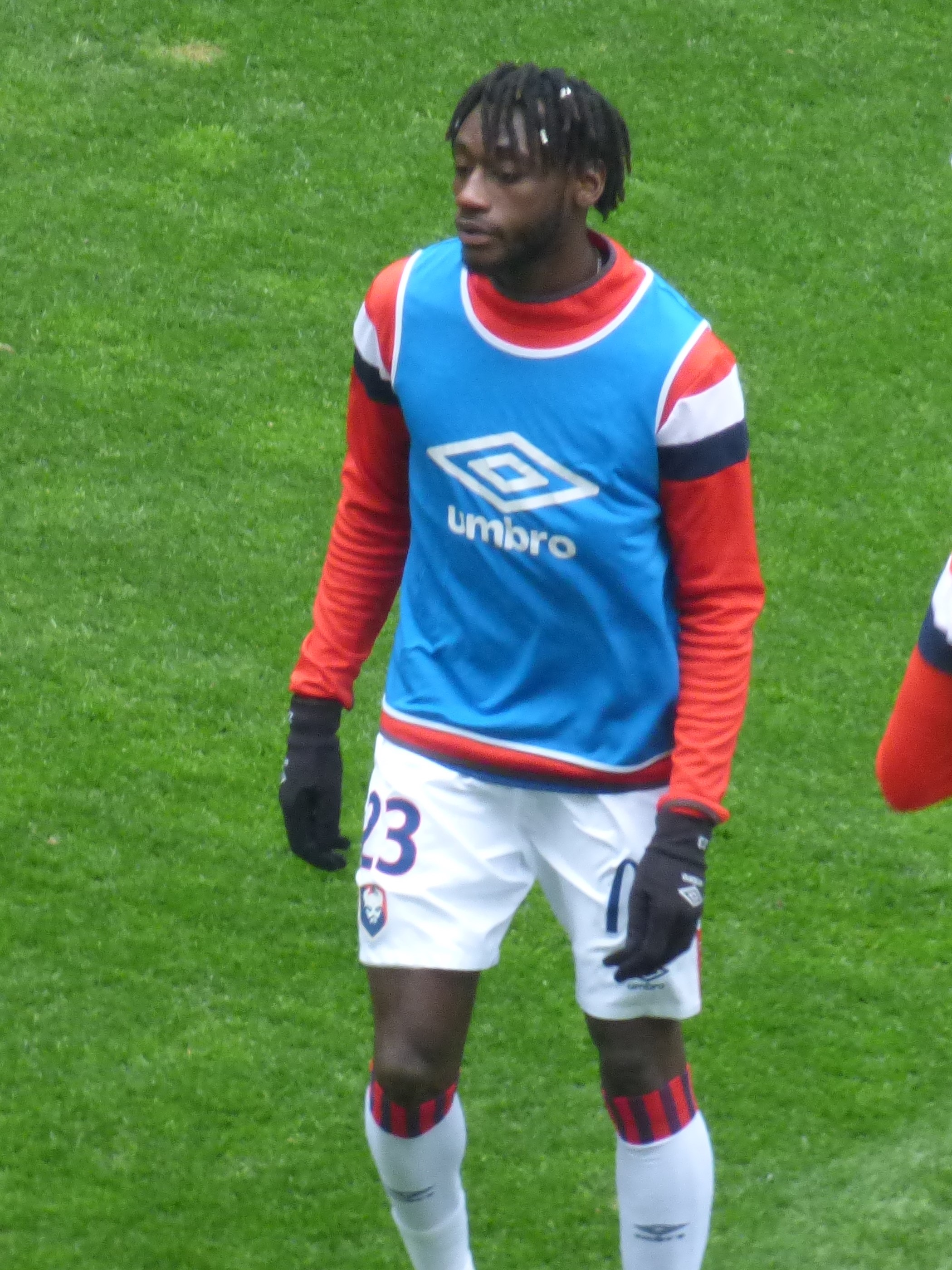 Herman Moussaki avant le match RC Lens / SM Caen, comptant pour la vingt-sixième journée du championnat de France de football de Ligue 2 2019/2020, le 22 février 2020, au Stade Bollaert-Delelis